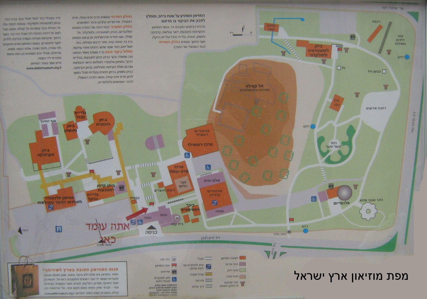 מפת מוזיאון א"י